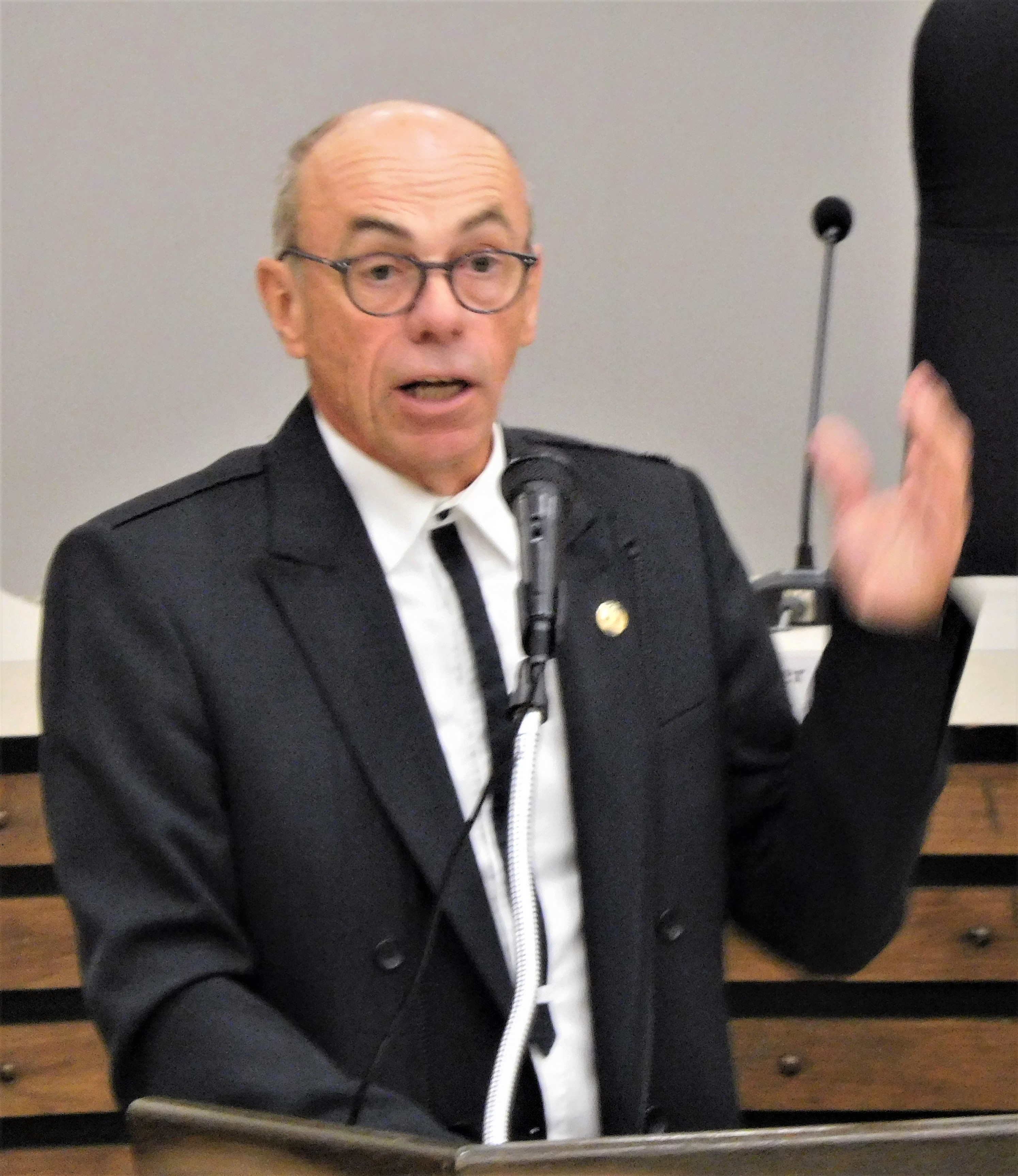 Inauguration du buste d'Onésime TremblayDenis Trottier, ex-député de Roberval et instigateur du projet